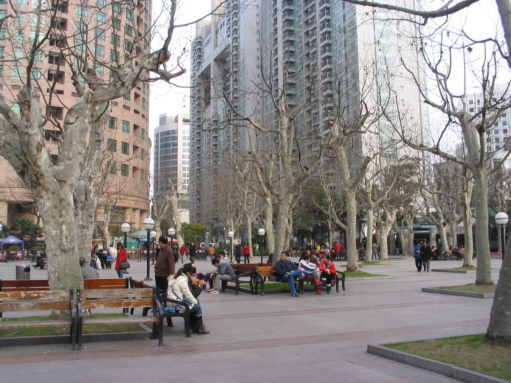 淮海公园 Hua Hai Park